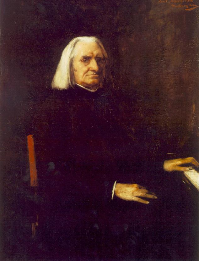 Portrait of Franz Liszt